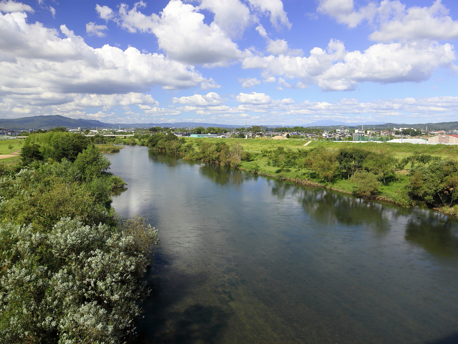 矢作川、豊田市白浜町、2011年